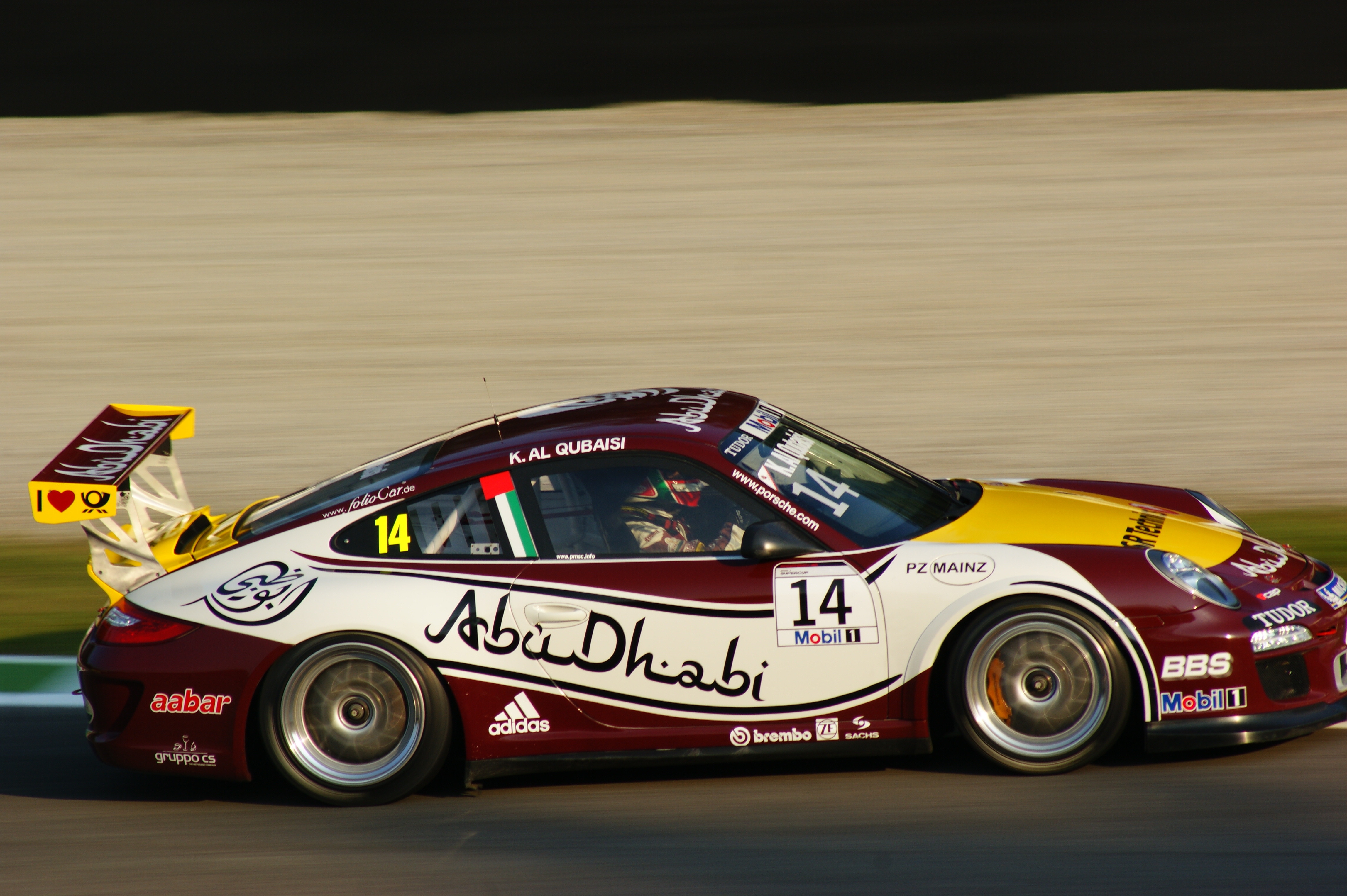 Khaled Al Qubaisi alla variante Ascari Monza 2011